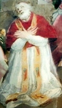 The Martyrdom of Pope Anicetus, frescoes by Antonio Circignani, called PomarancioChapel of Sant'Aniceto e Beata Vergine della Clemenza, Palazzo Altemps, Roma